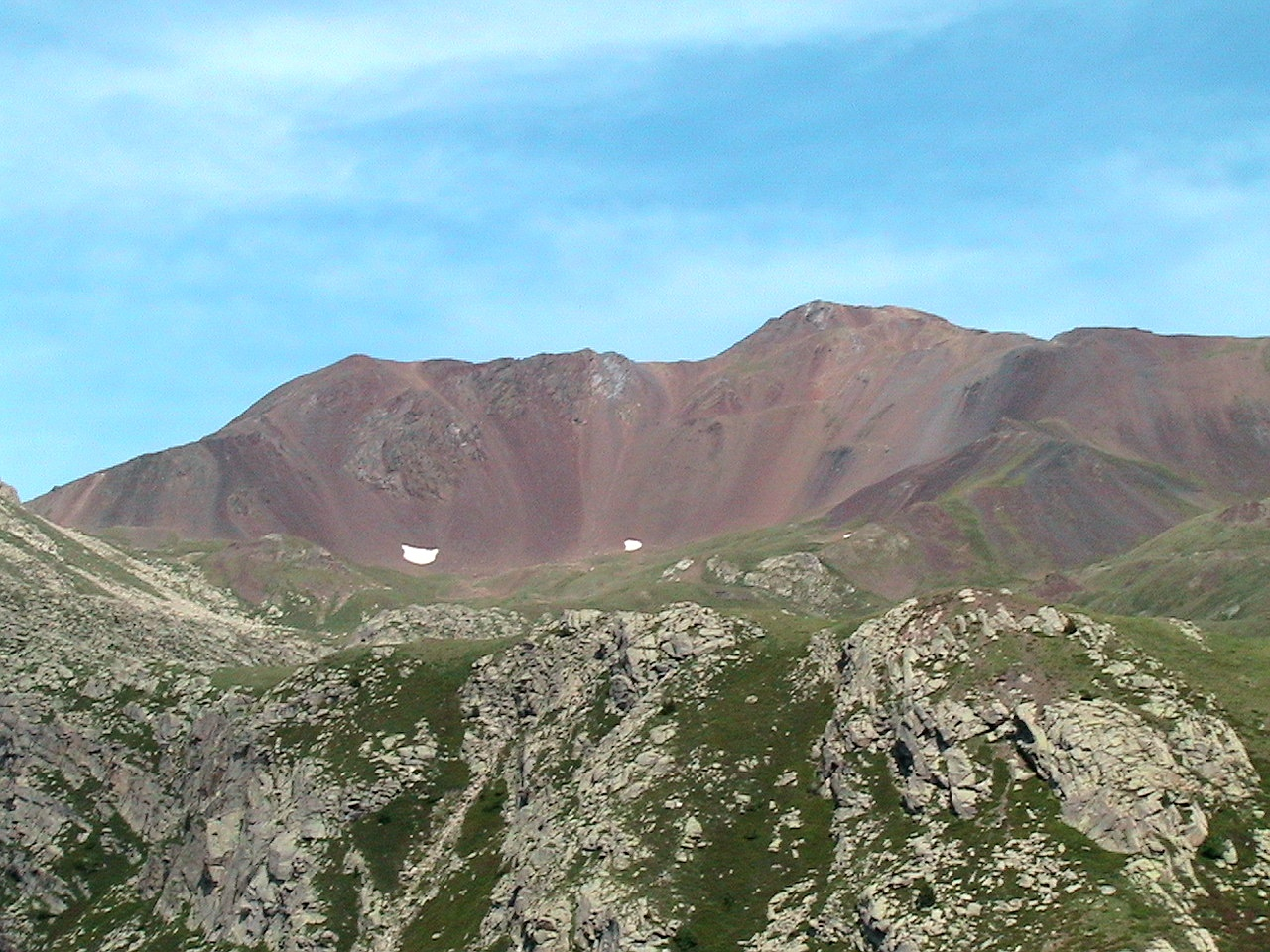 El Montorroio vist des del refugi d'Estany Gento (Vall Fosca - Pallars Jussà)